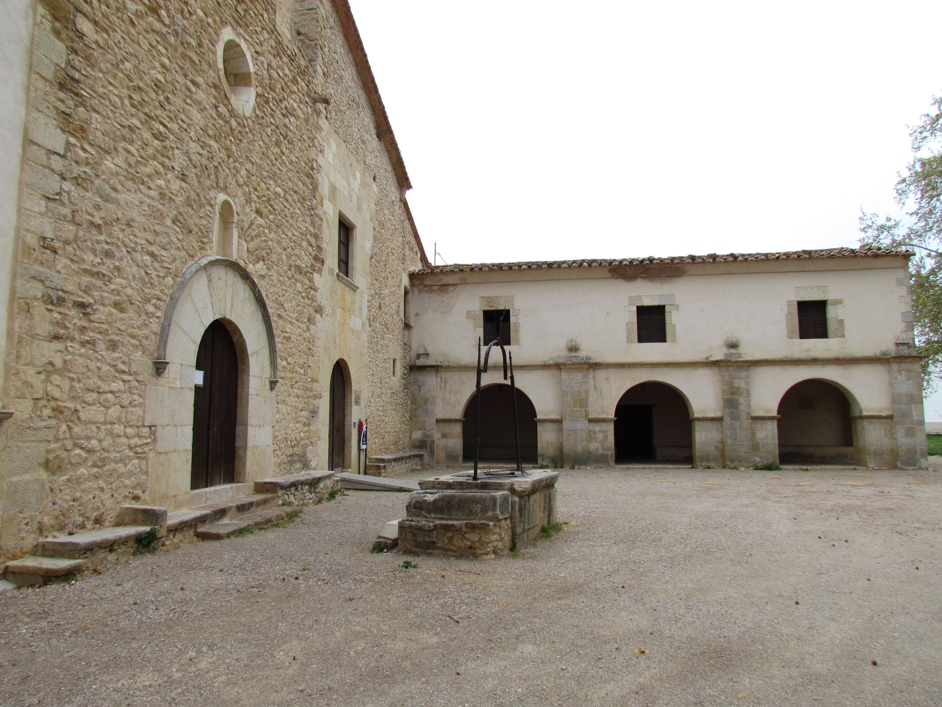 Vista general de l'ermita de Sant Pau d'Albocàsser (Alt Maestrat)